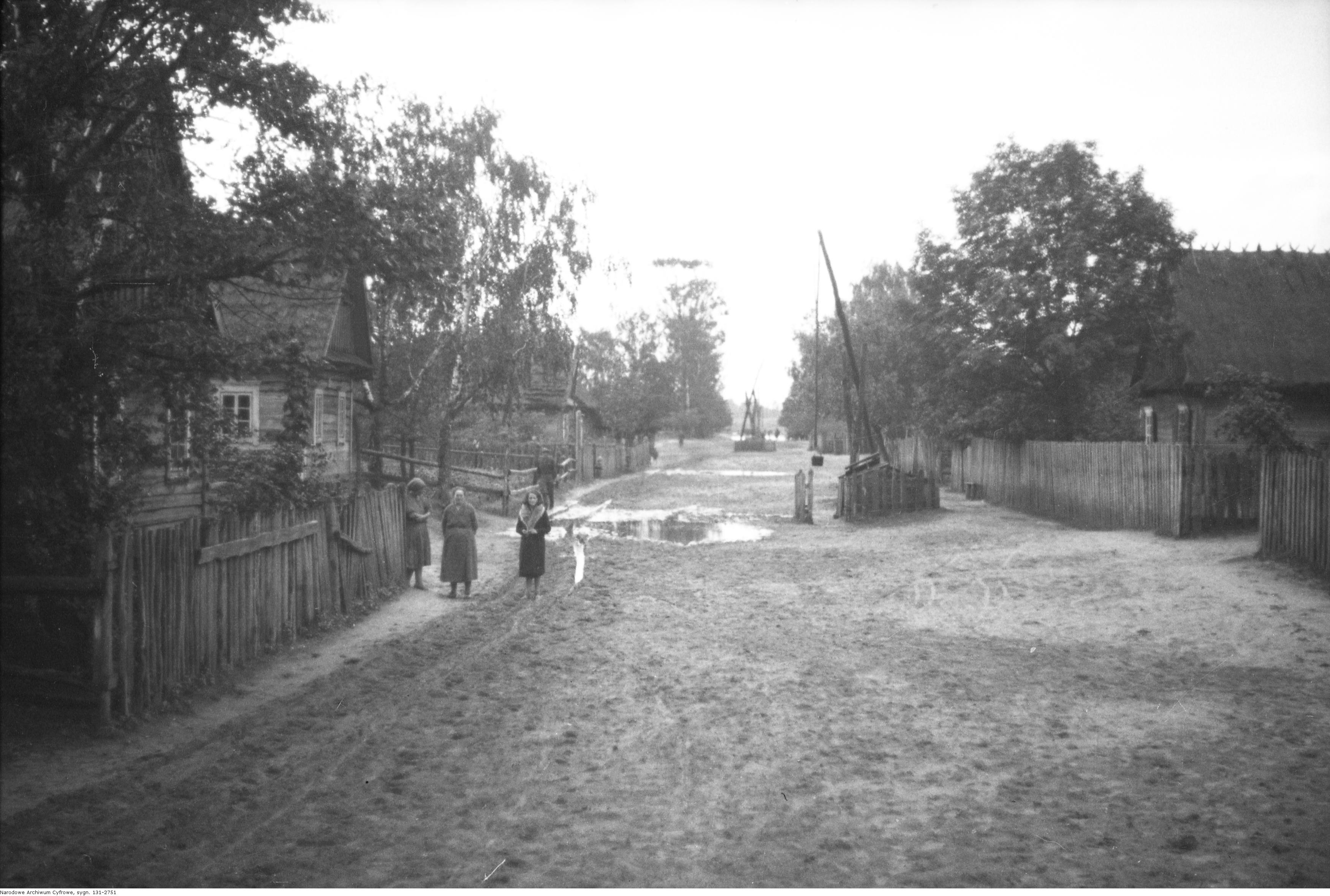 Ulica we wsi.